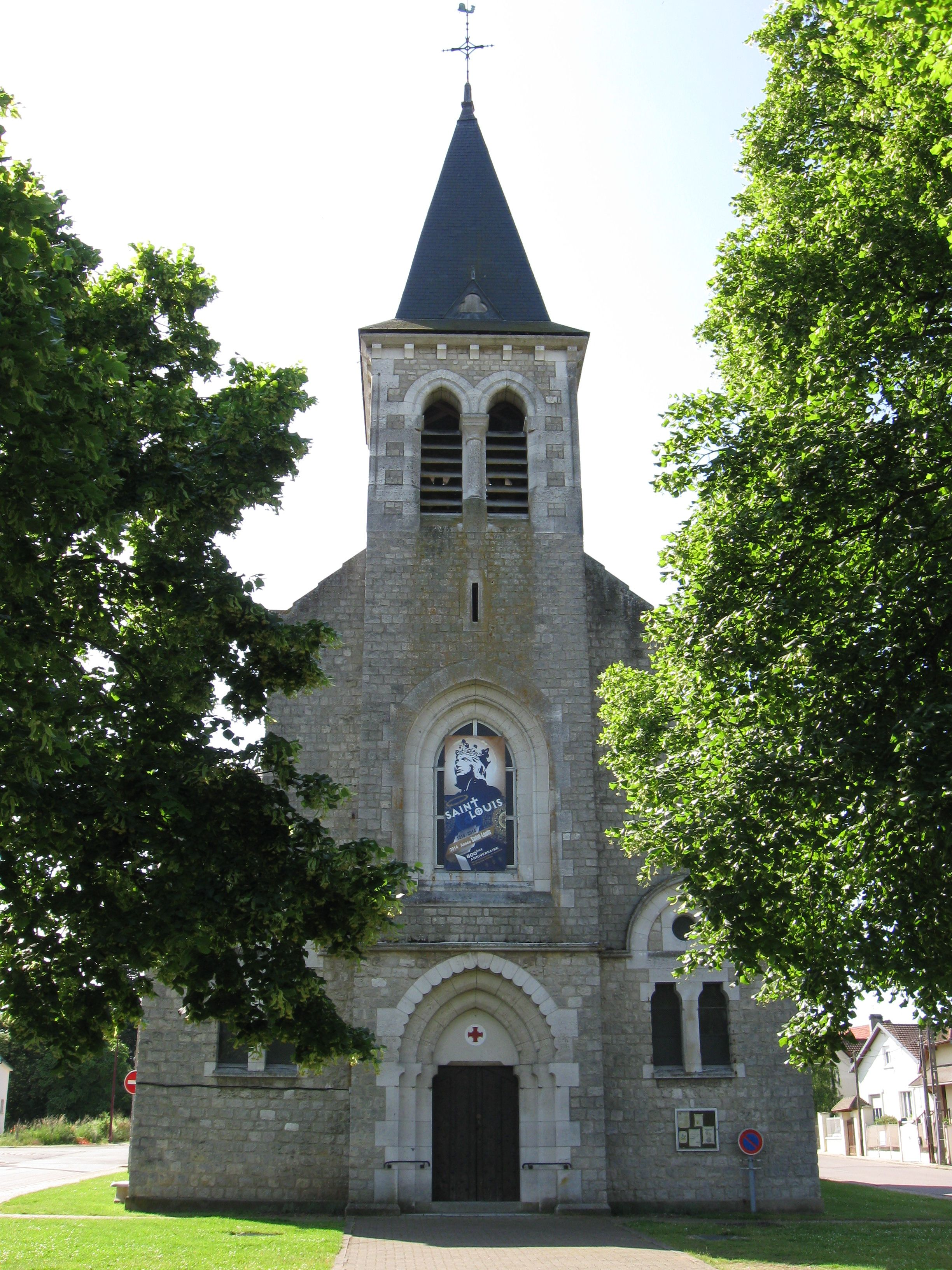 Église Saint-Martin de Freneuse. (département des Yvelines, région Île-de-France).